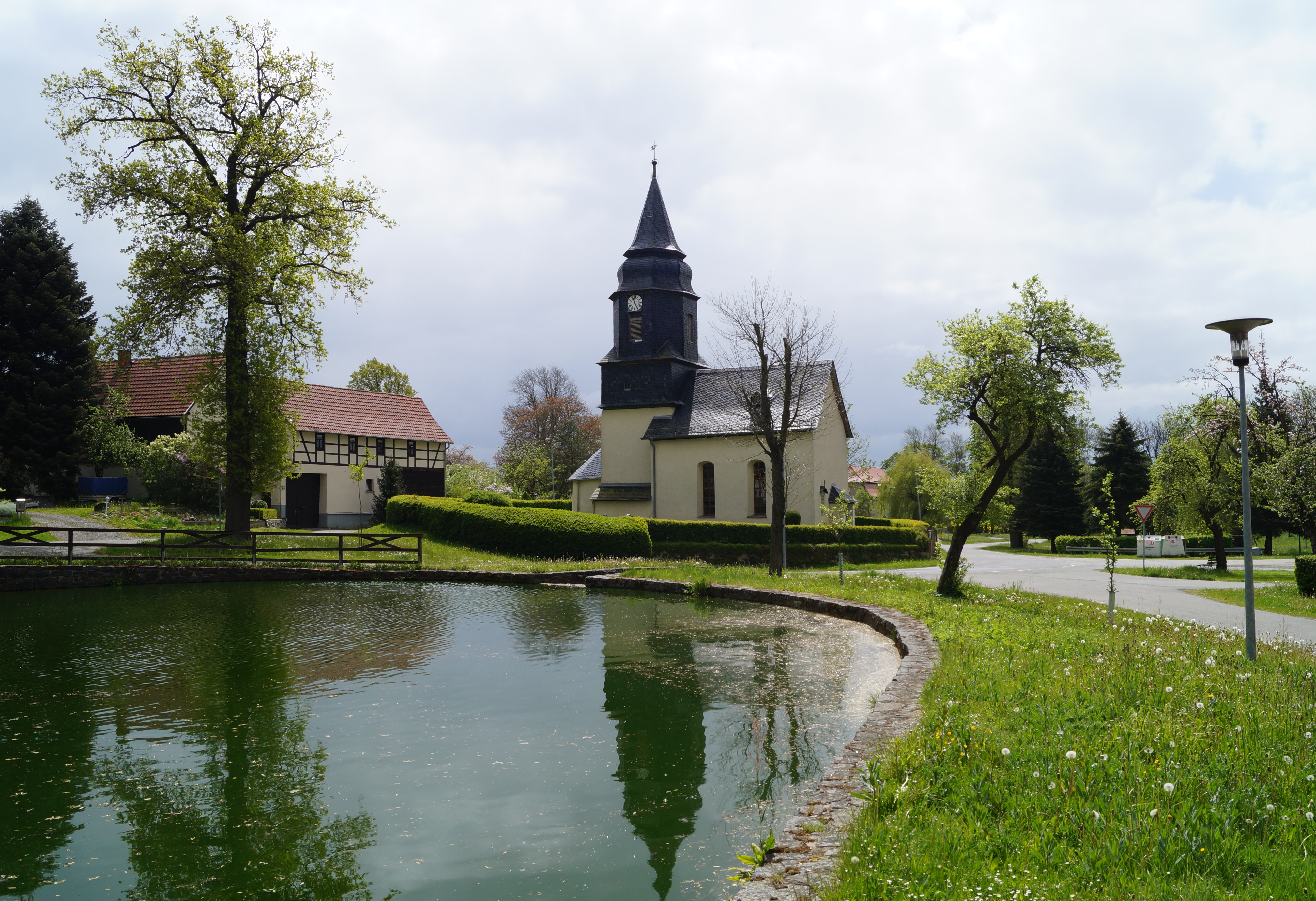 Pahnstangen